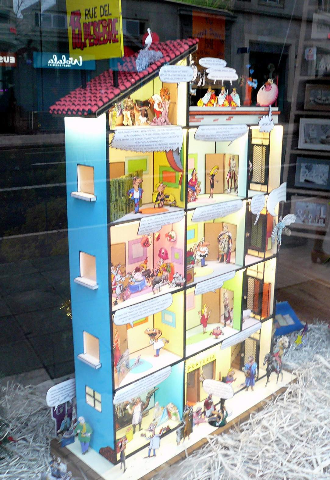 Vitoria